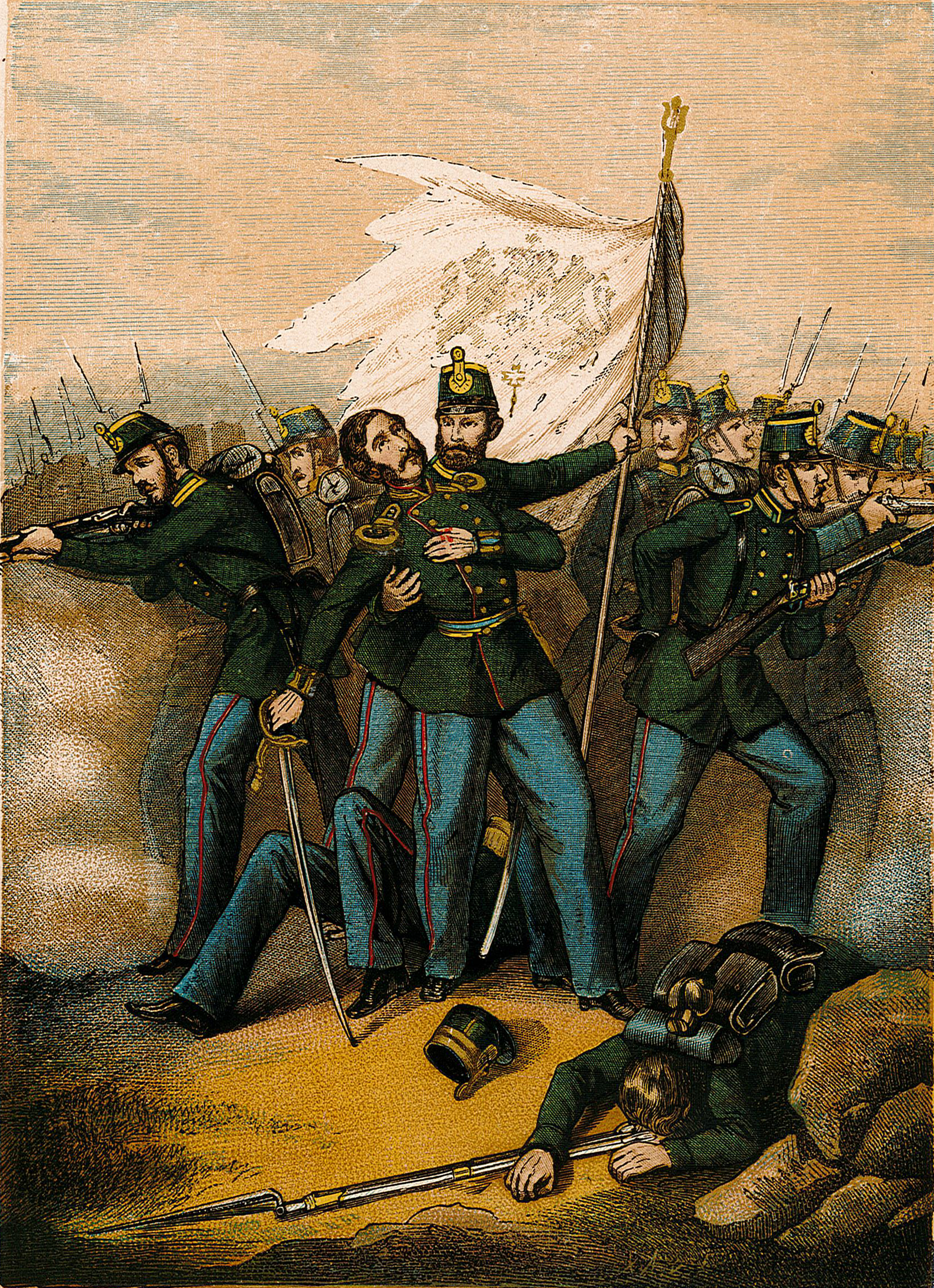 Uniformer för ”Kongl. Norr- och Westerbottens Fältjägare-Corpser.”